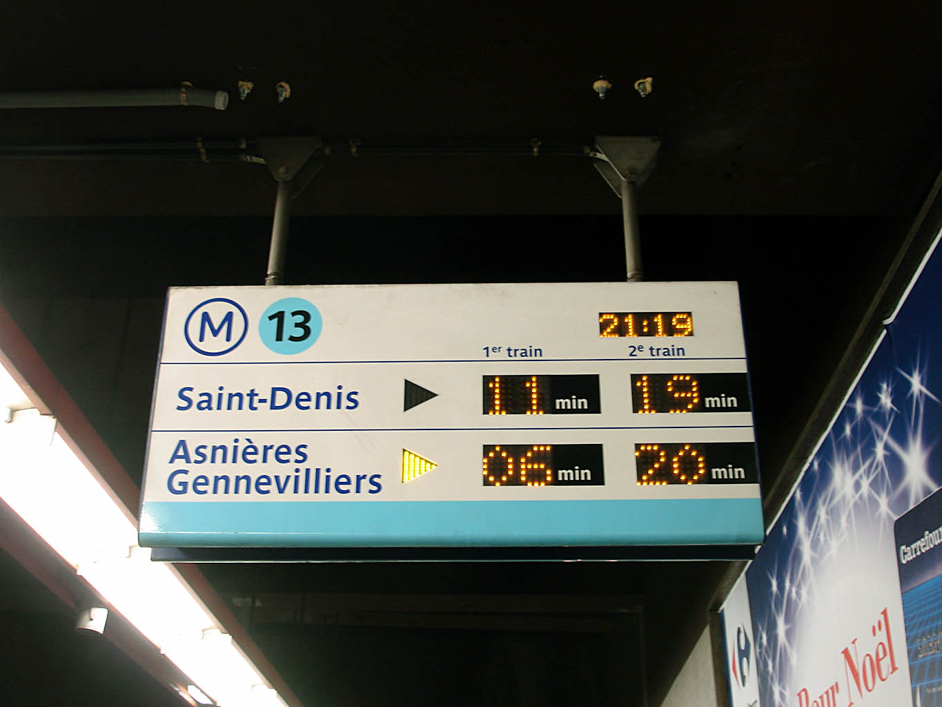 Panneau SIEL, station Miromesnil de la ligne 13 du métro de Paris, France.